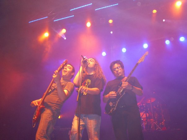 LA PAZ encuentro